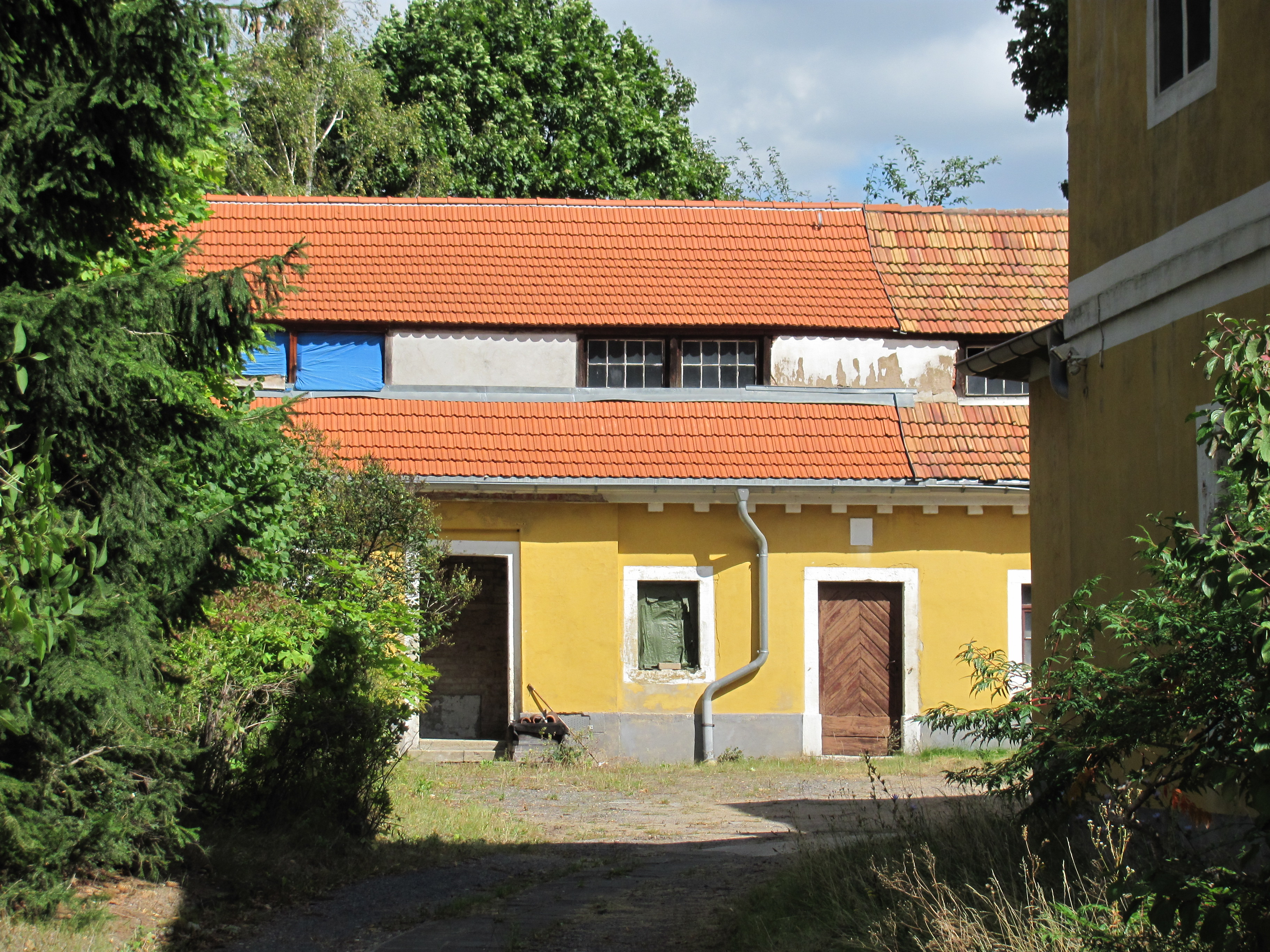 Villa Coelestine von Stechow